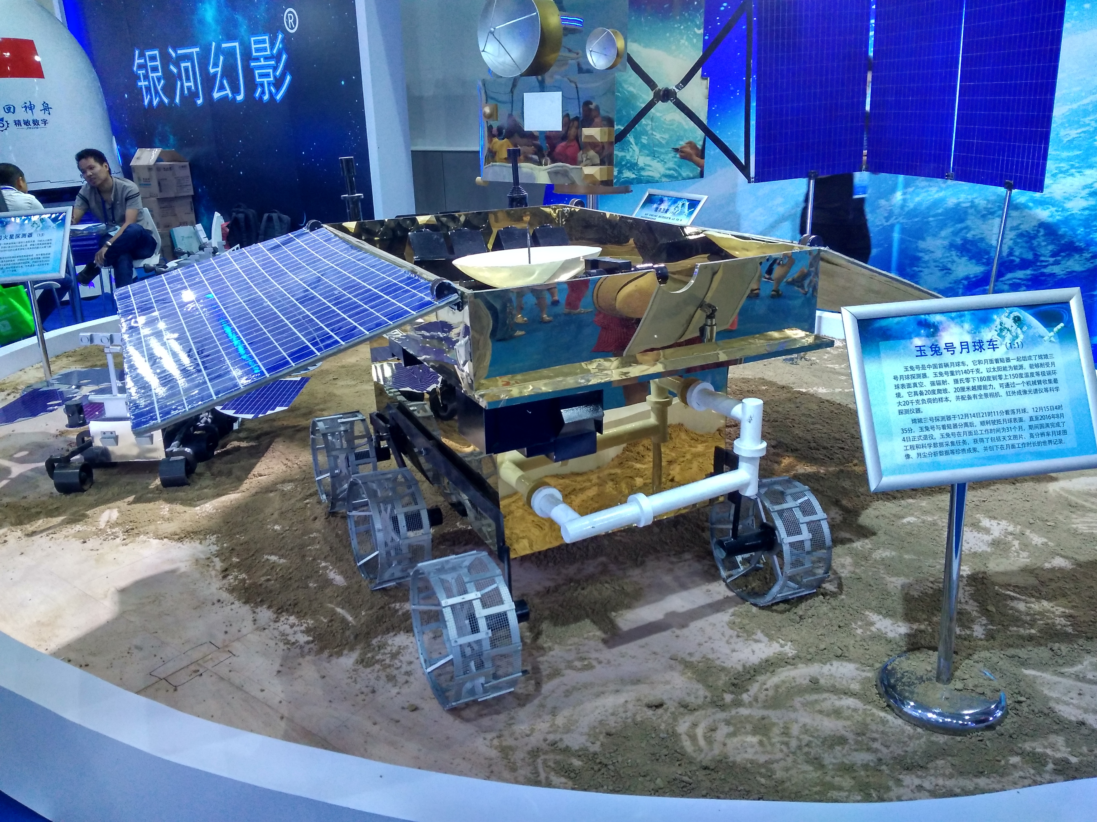 在于青岛市黄岛区举行的2018东亚海洋合作平台青岛论坛东亚商品展中展出的玉兔号月球车1：1模型